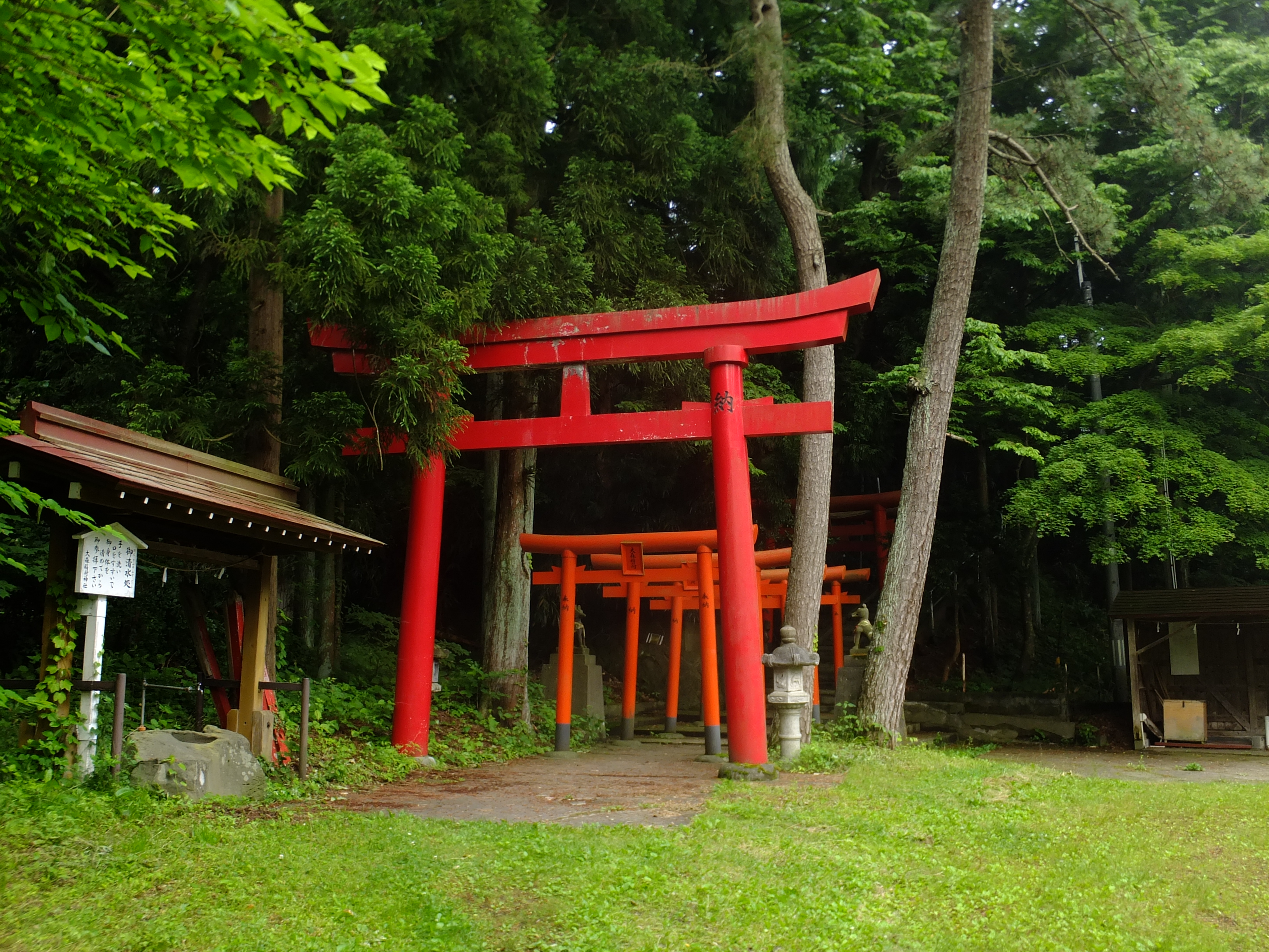 秋田県能代市、風の松原の中にある大森稲荷神社。 2017年6月5日放送のNHK「鶴瓶の家族に乾杯」の中で笑福亭鶴瓶と福士蒼汰が参拝している。